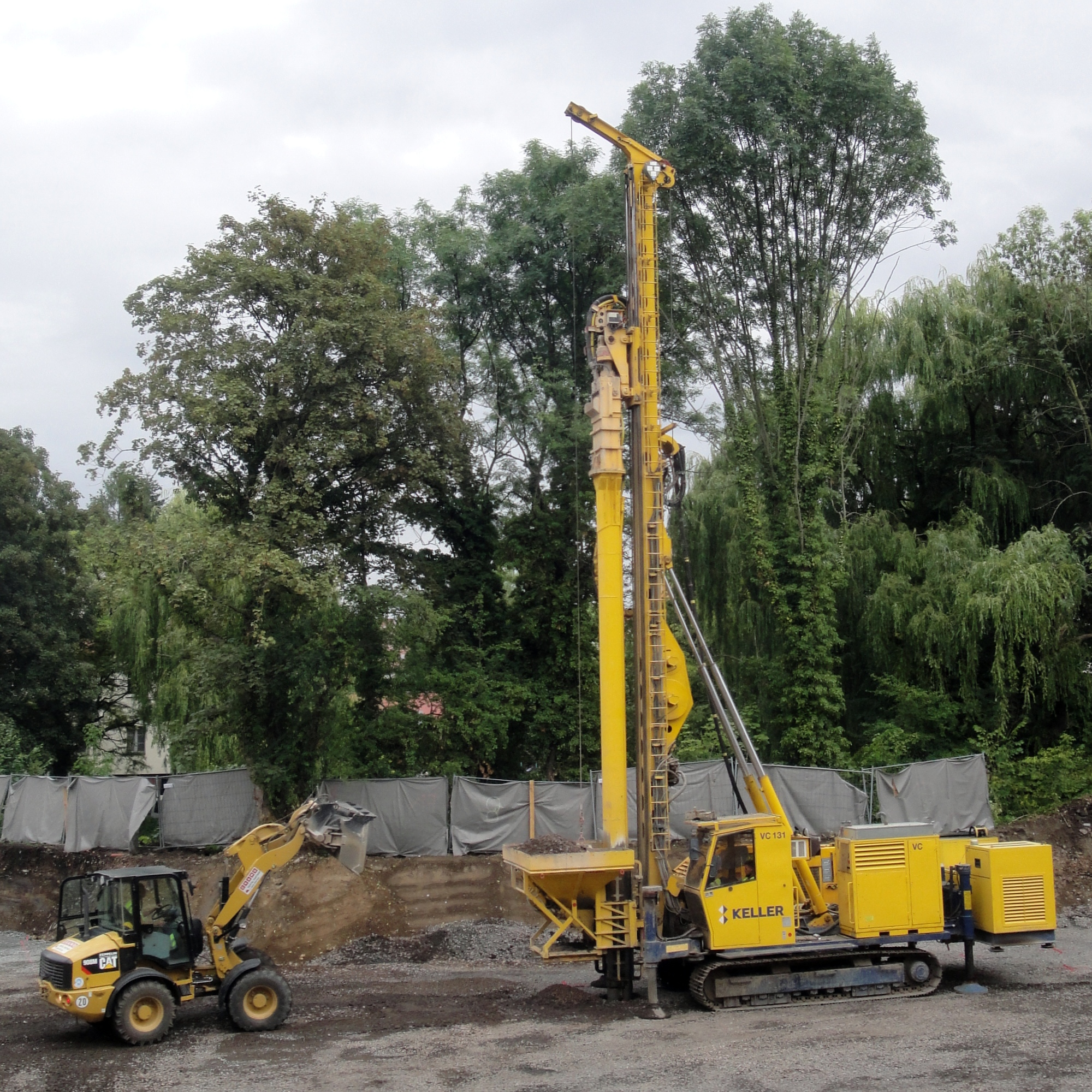 VC 131, Keller Grundbau, Rüttelstopfverdichtung in Leipzig